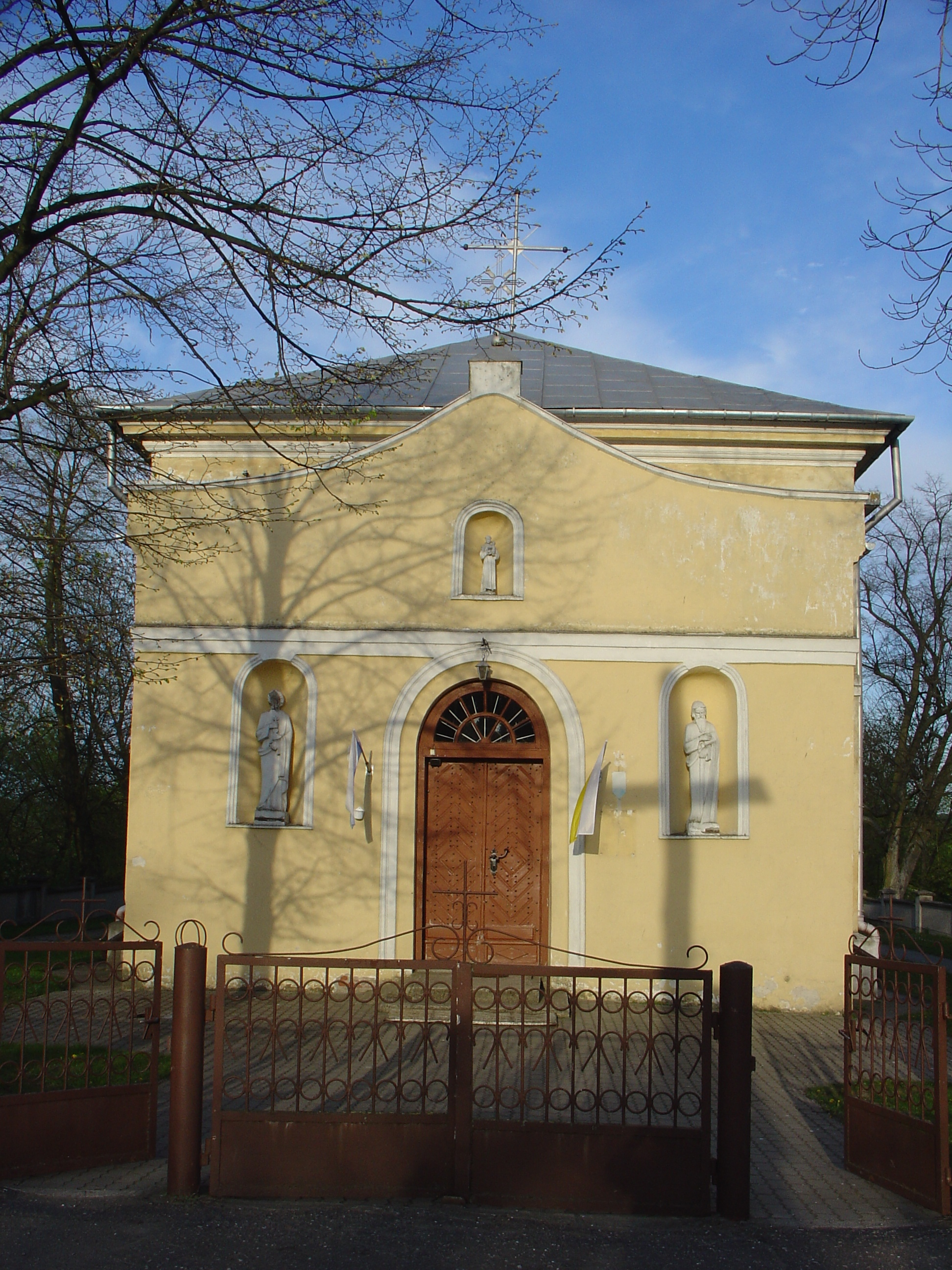 Wirów - dawna cerkiew greckokatolicka, obecnie kościół p.w. św. Antoniego z Padwy (zabytek nr rejestr. 618)